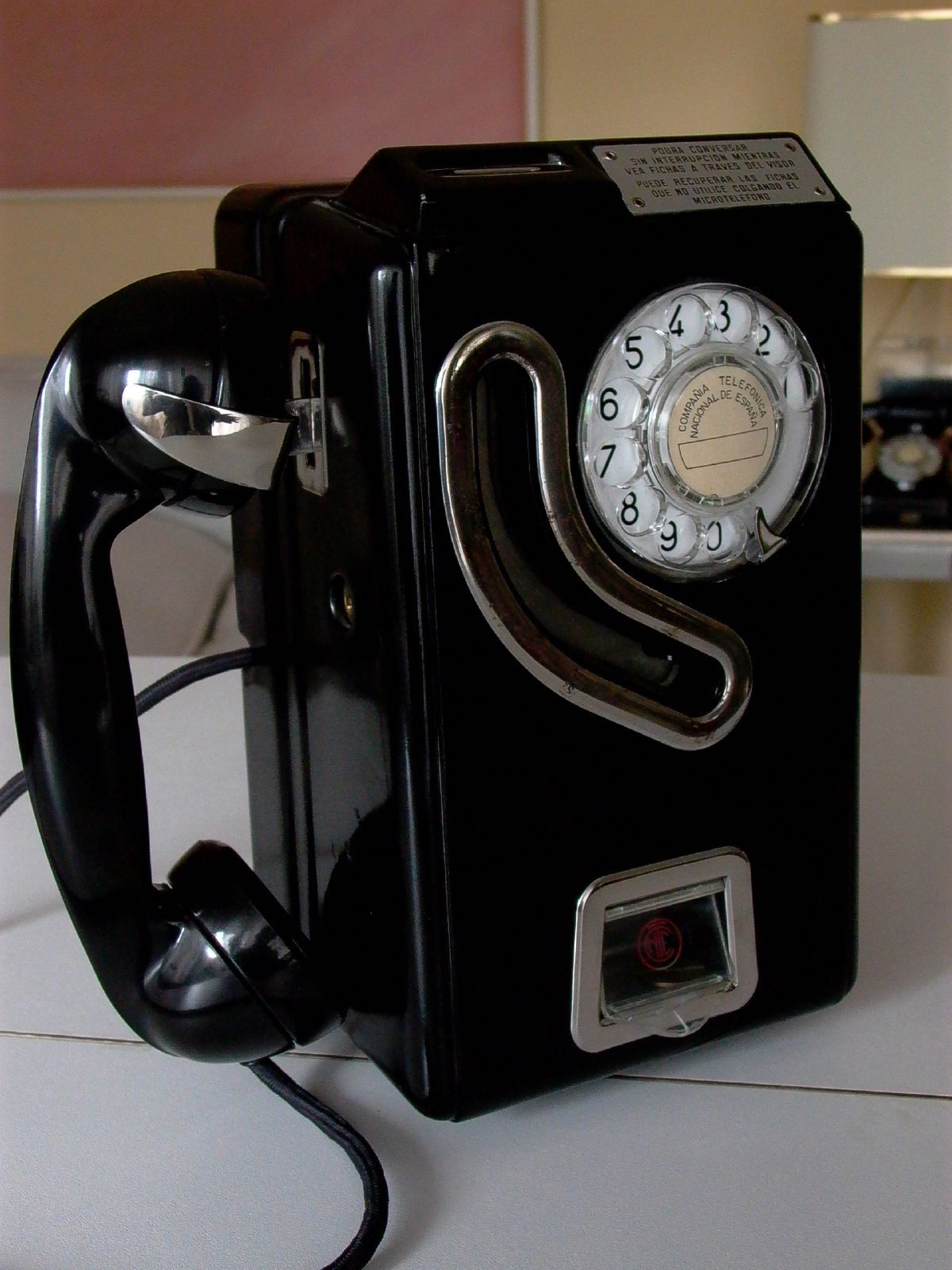 Teléfono de fichas español de la década de los 60.